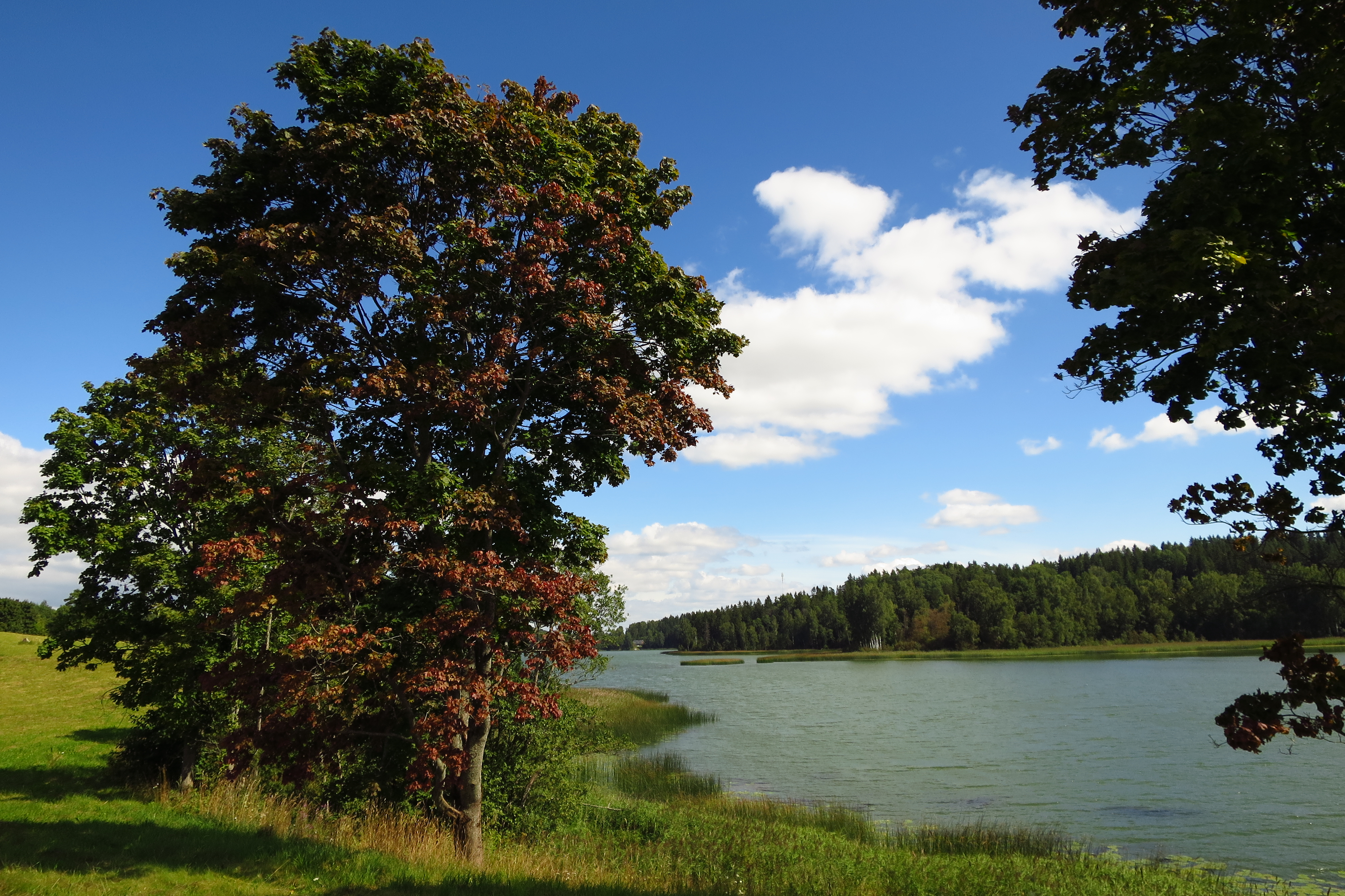 Pangodi järve edelakaldal Pangodi MKA